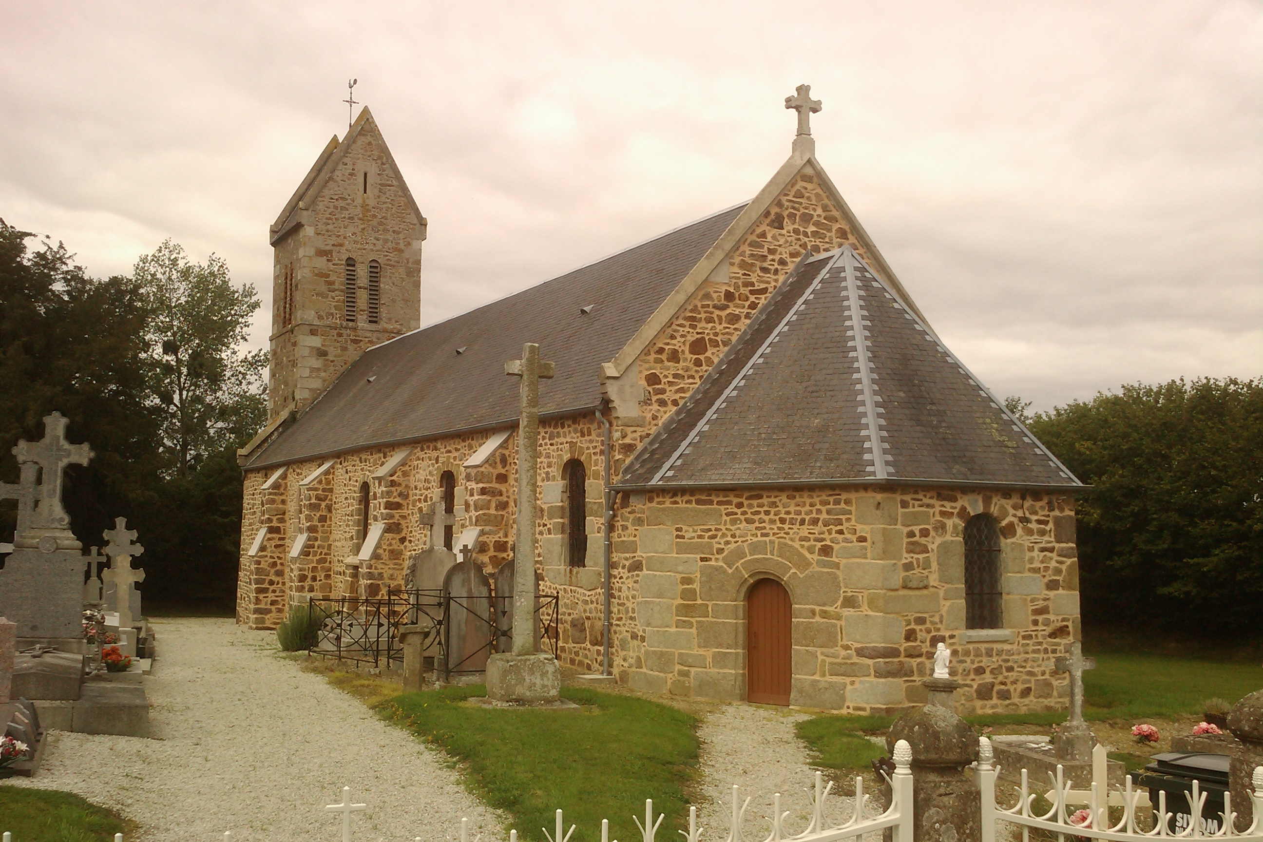 Église Saint Pierre de Chevry